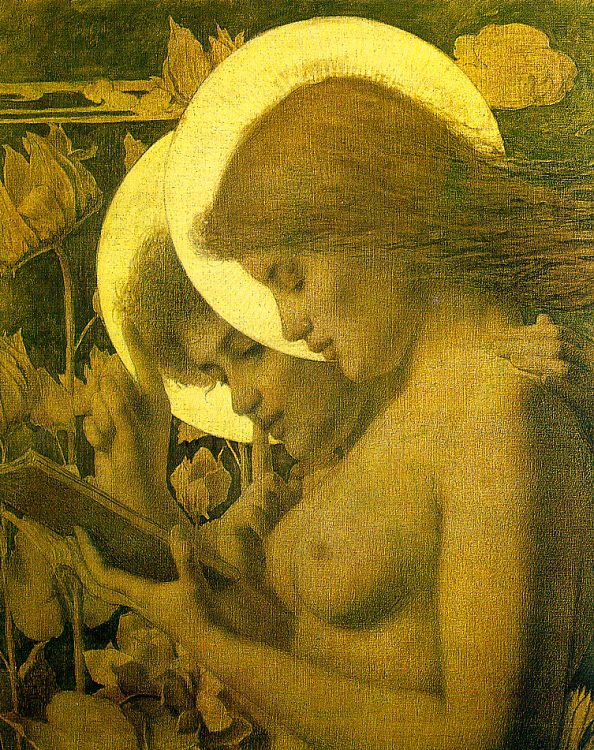 Les Auréoles